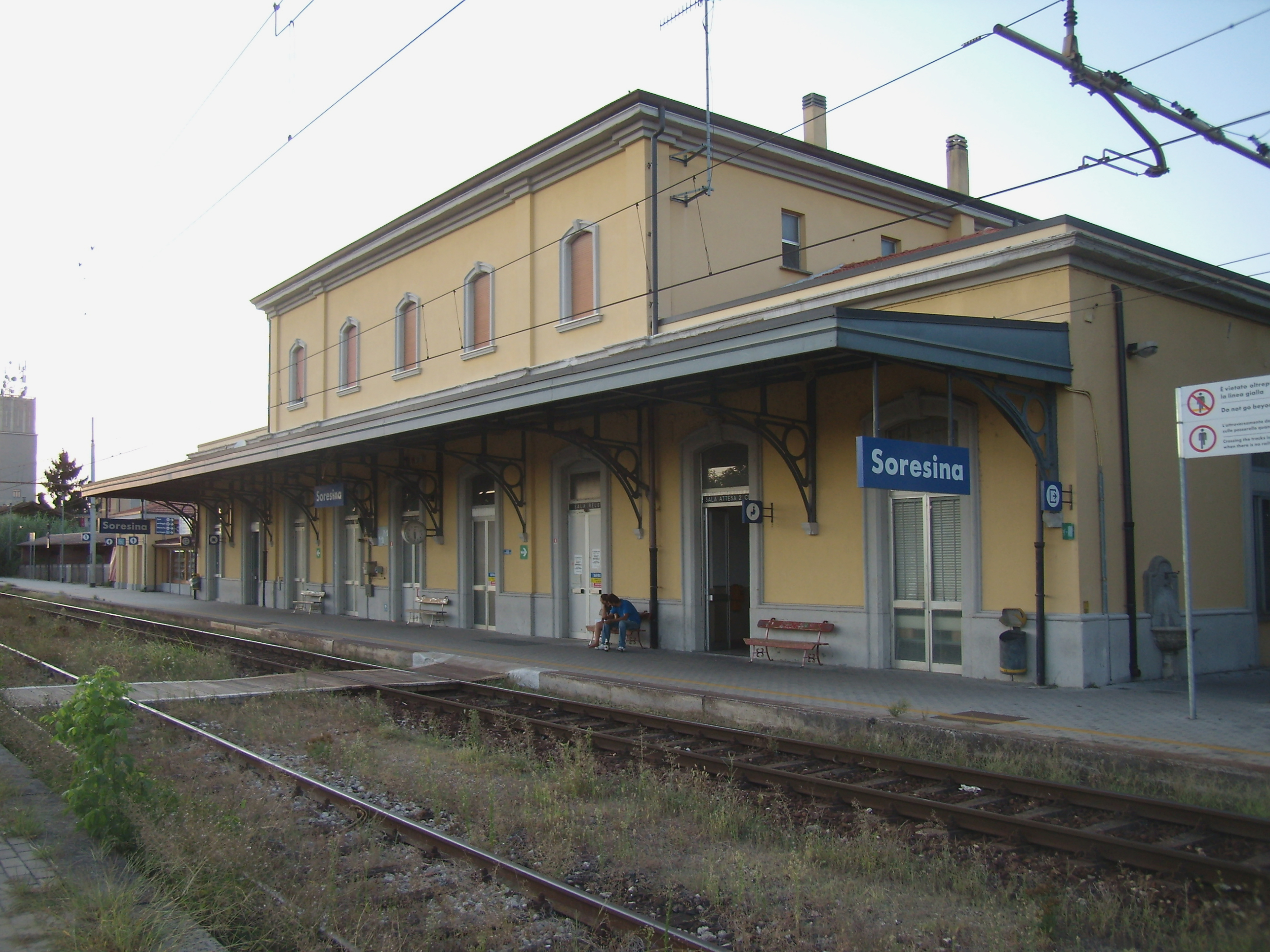 Stazione ferroviaria di Soresina.